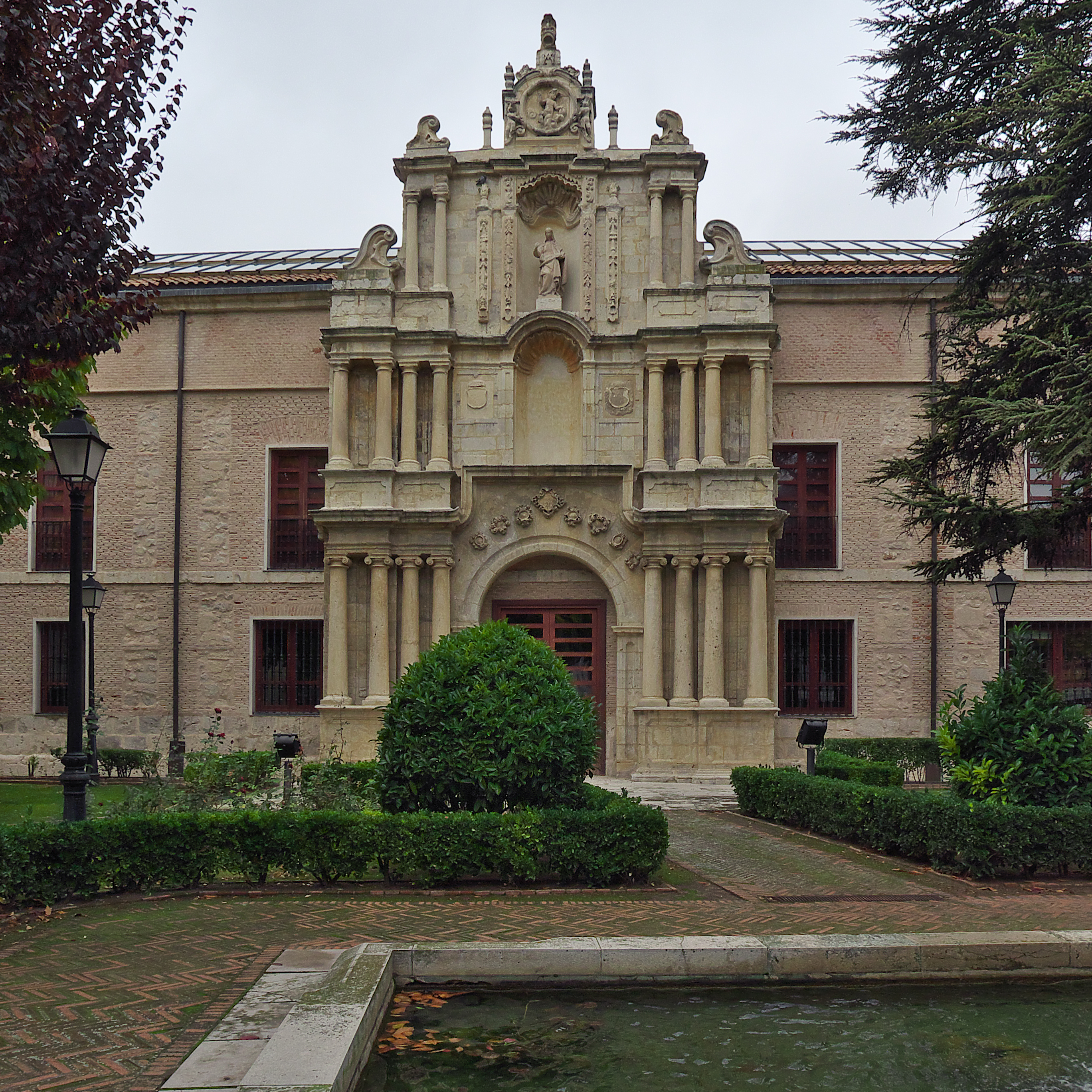 Portada del desaparecido Colegio de San Ambrosio, proyectada por Francisco de Praves, afortunadamente trasladada al Palacio de Santa Cruz.